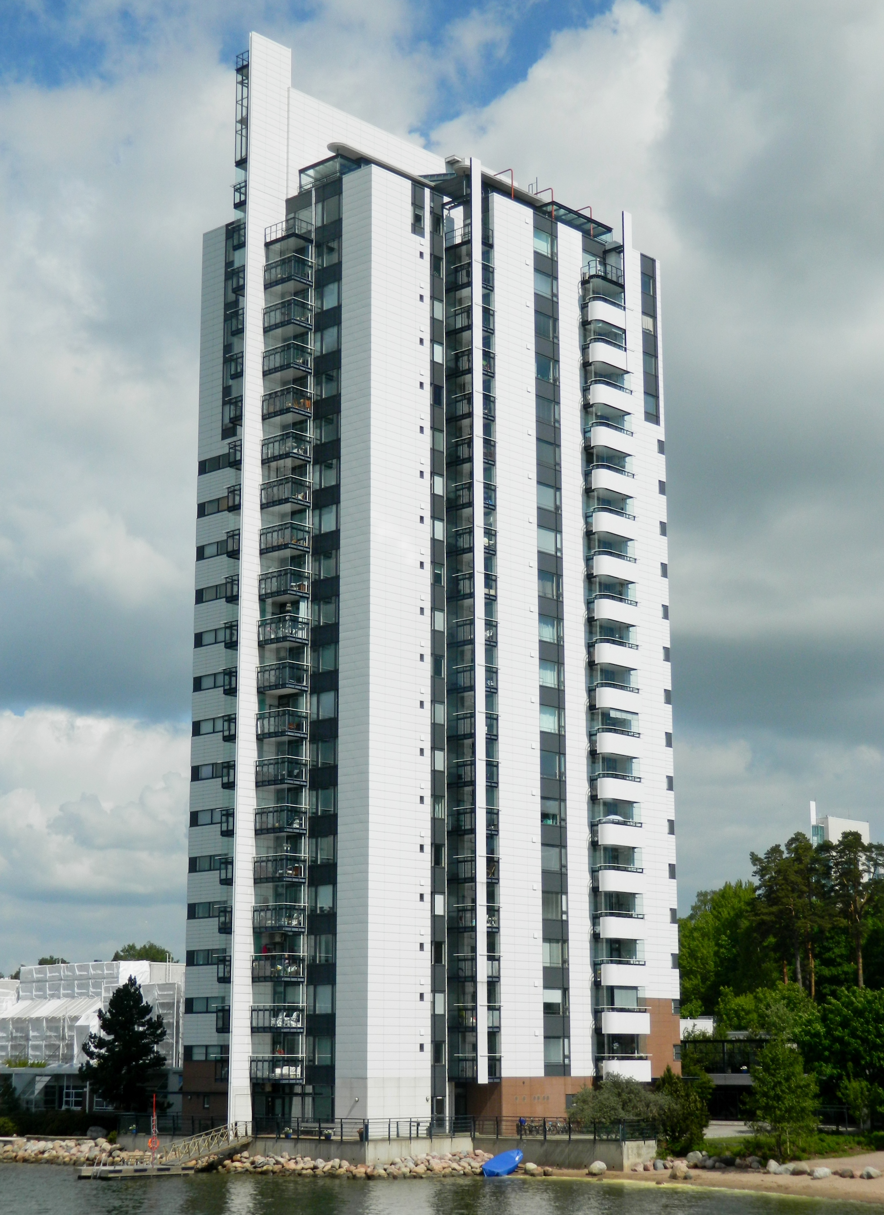 Meritorni Espoon Kivenlahdessa